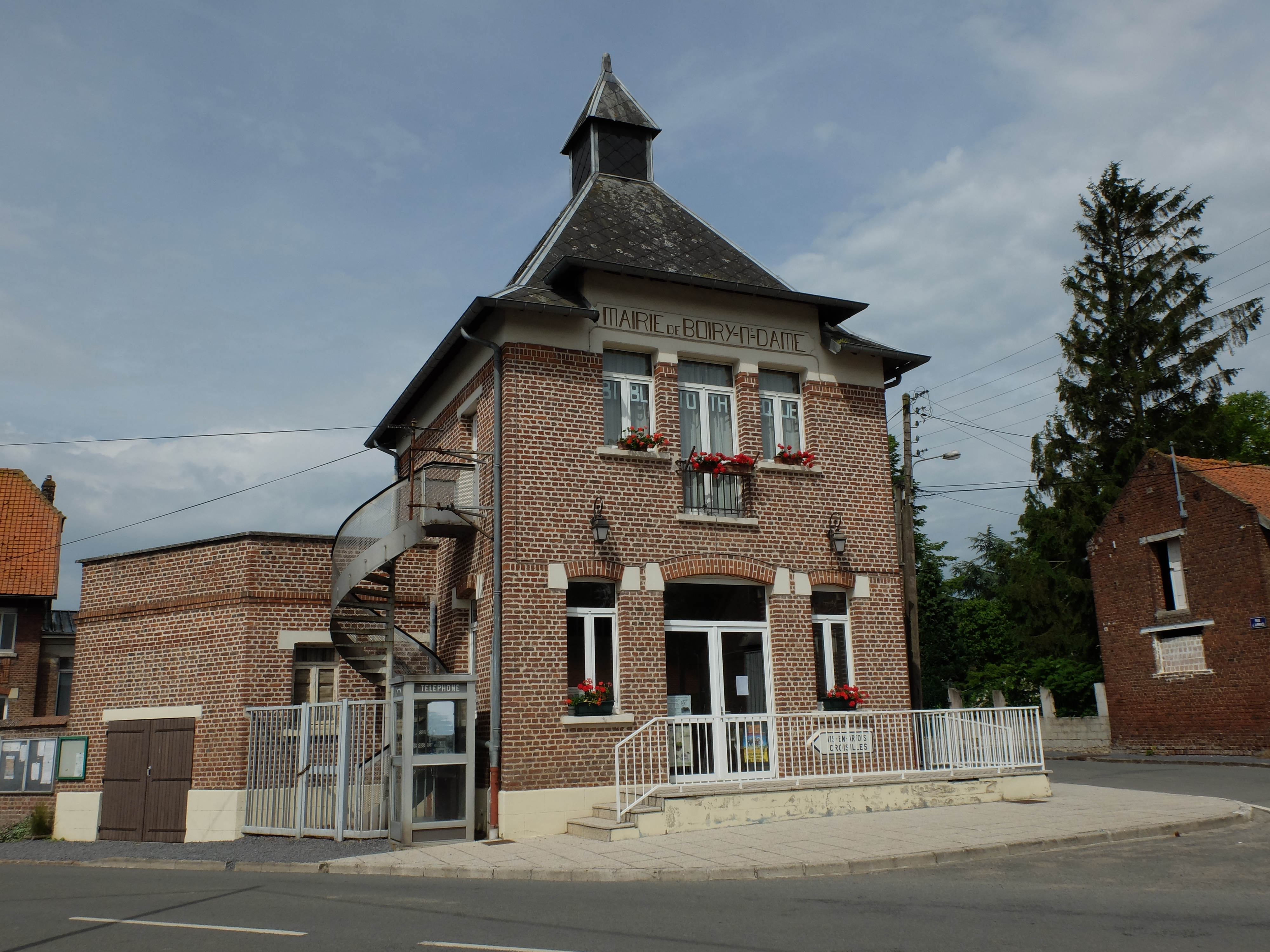 Vue de la mairie de Boiry-Notre-Dame.